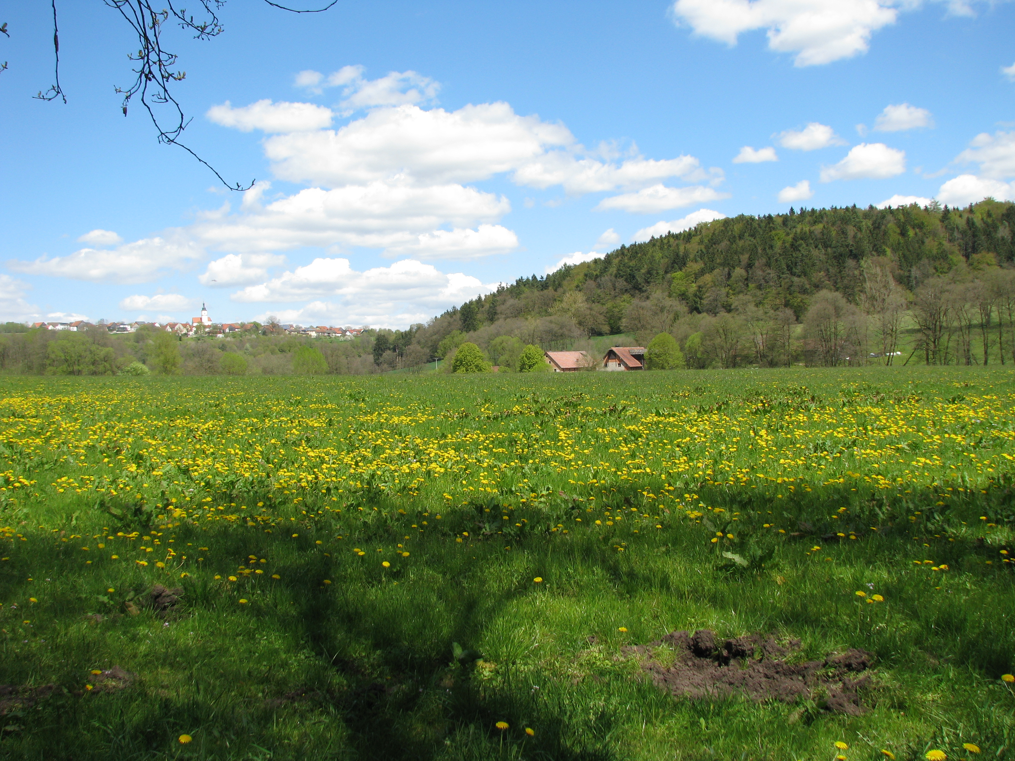 Kreismühle, Ortsteil von Deining im Landkreis Neumarkt in der Oberpfalz, Bayern